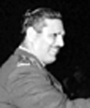 Abd el razaq aref